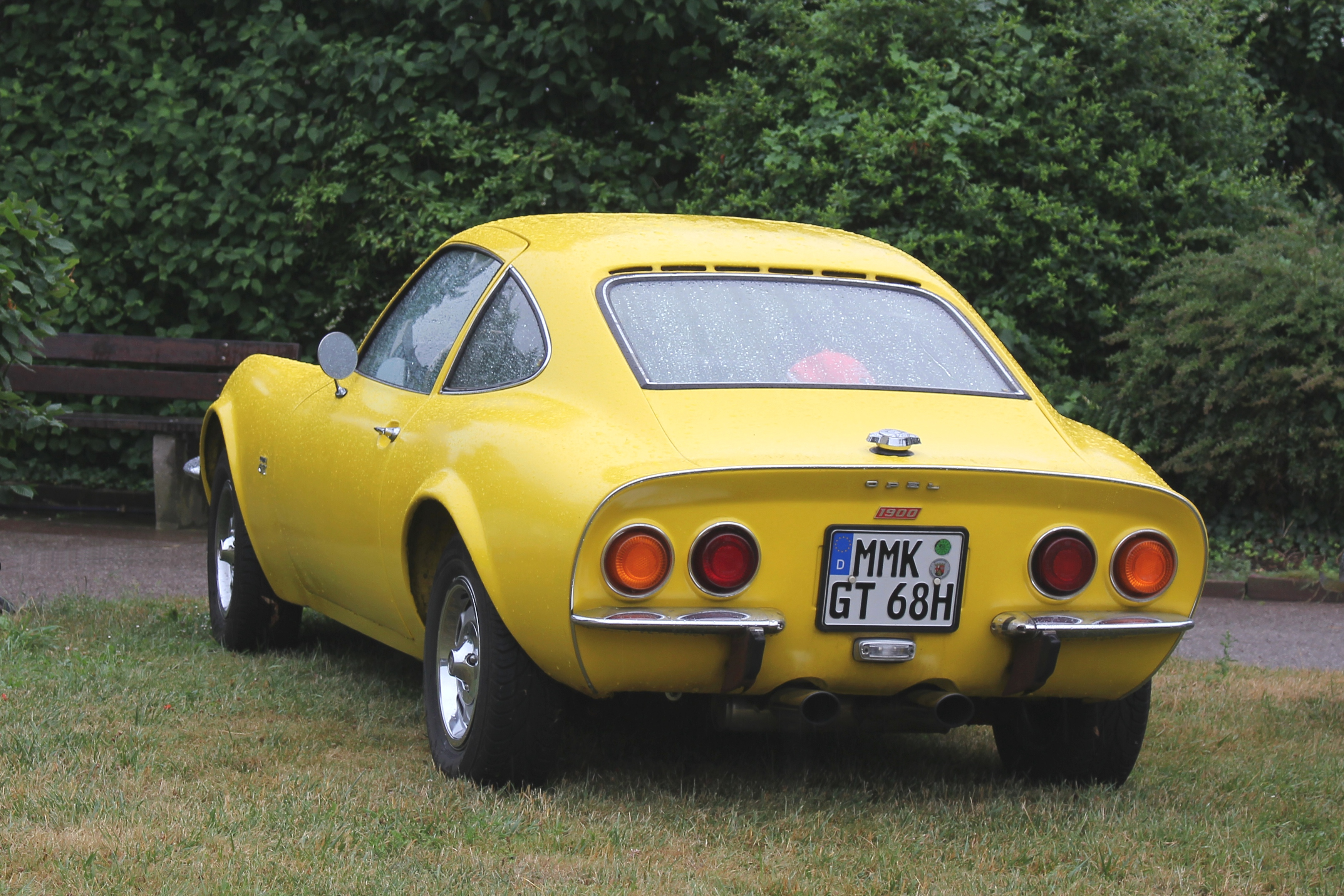 Opel GT 1900, Bauzeit 1968 bis 1973, fotografiert beim Oldtimertreffen „Europa-Klassik“ in Andernach 2016